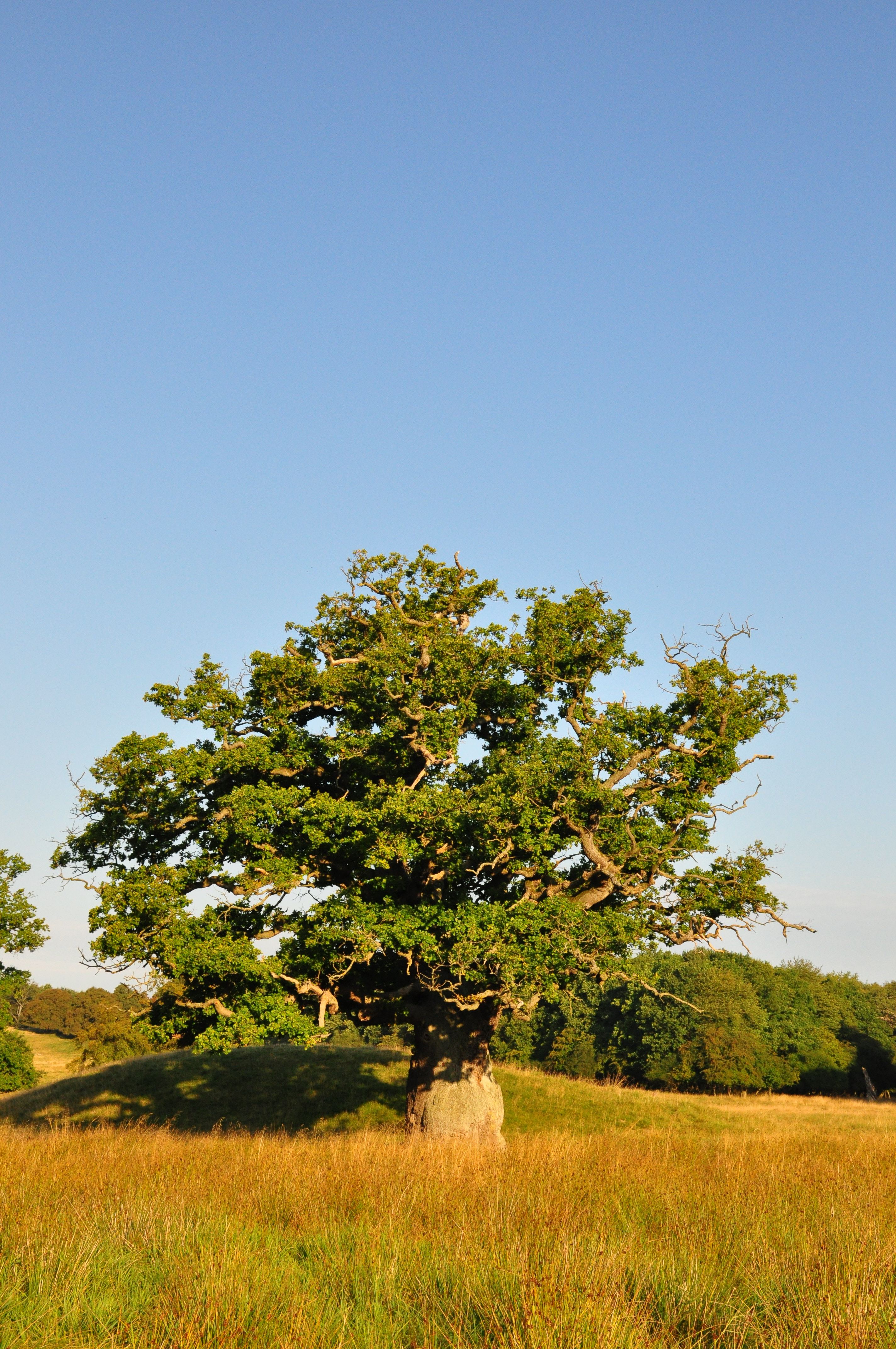 Old tree in Jægersborg Dyrehave north of Copenhagen, Denmark